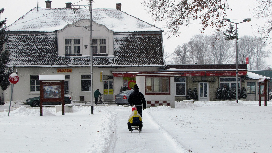 Centar Đurđenovca - siječanj 2016.